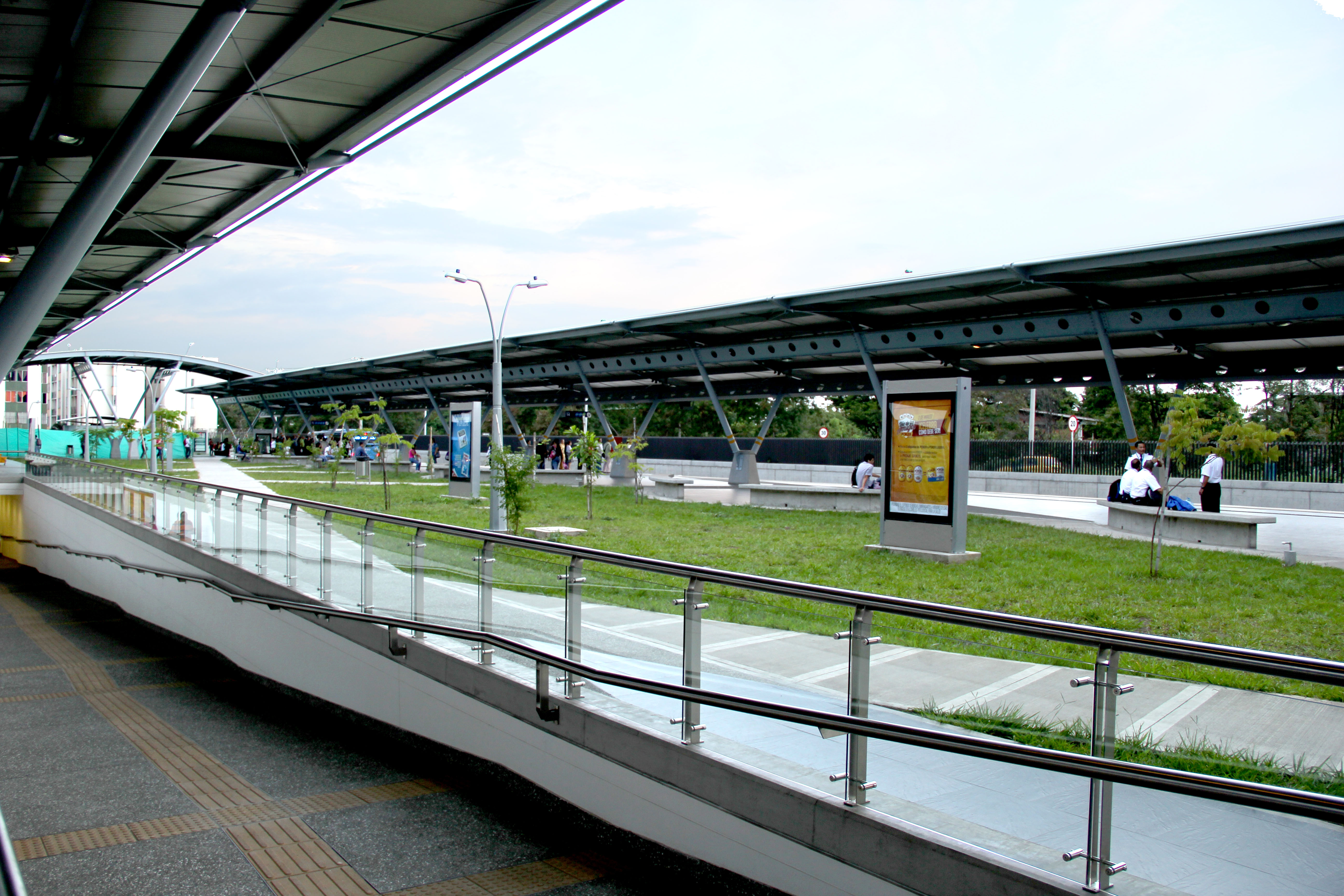 Terminal de cabecera del Sistema Integrado de Transporte Masivo de la ciudad de Cali, Colombia